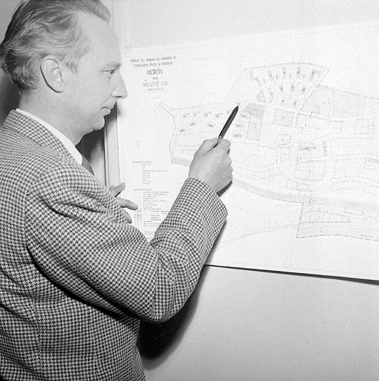 Bildbeskrivning: "Stadsarkitekt Lindström. Morön planeras." Fotot är förvärvat från Fritze Lindholm.